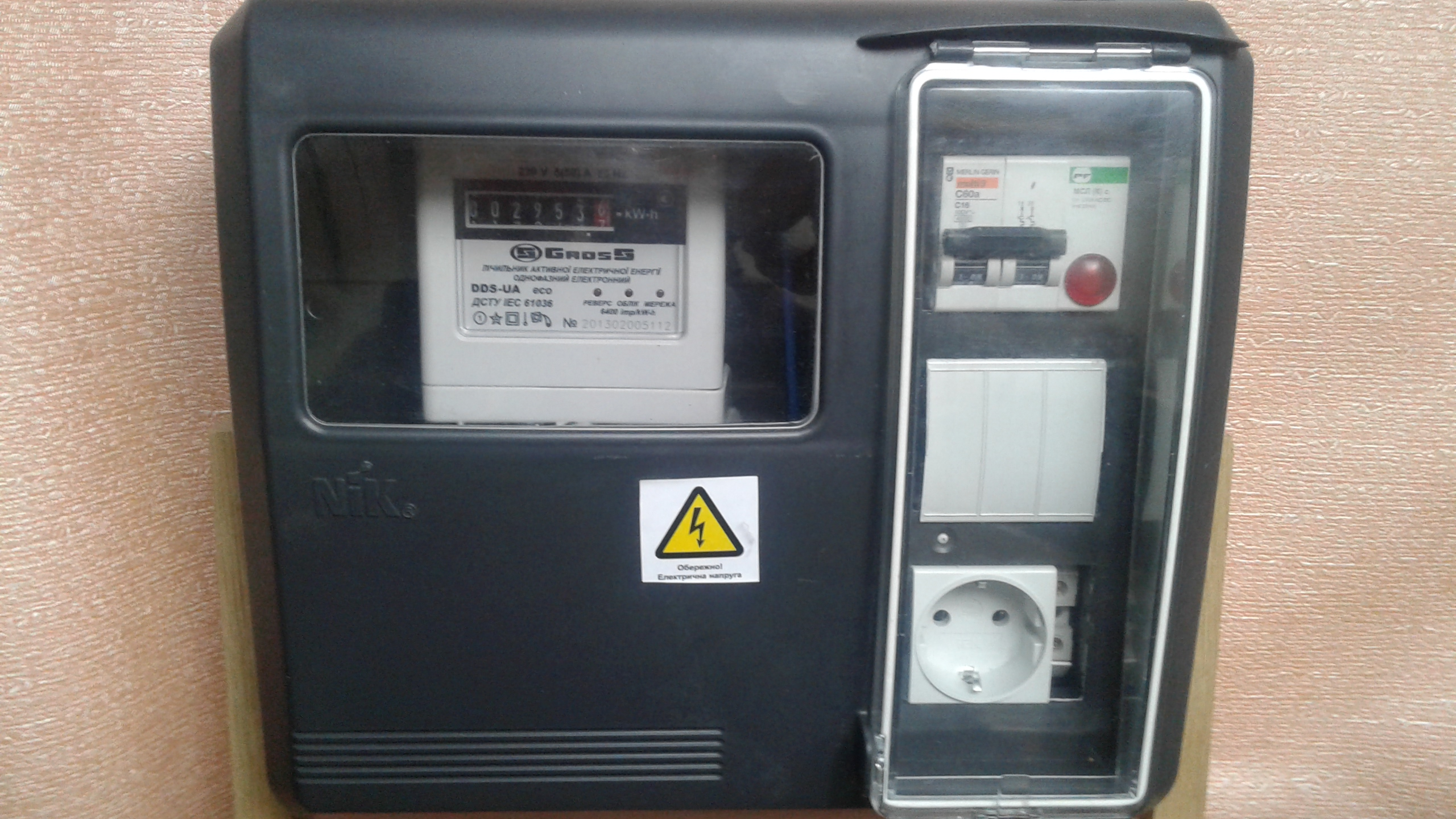 щиток